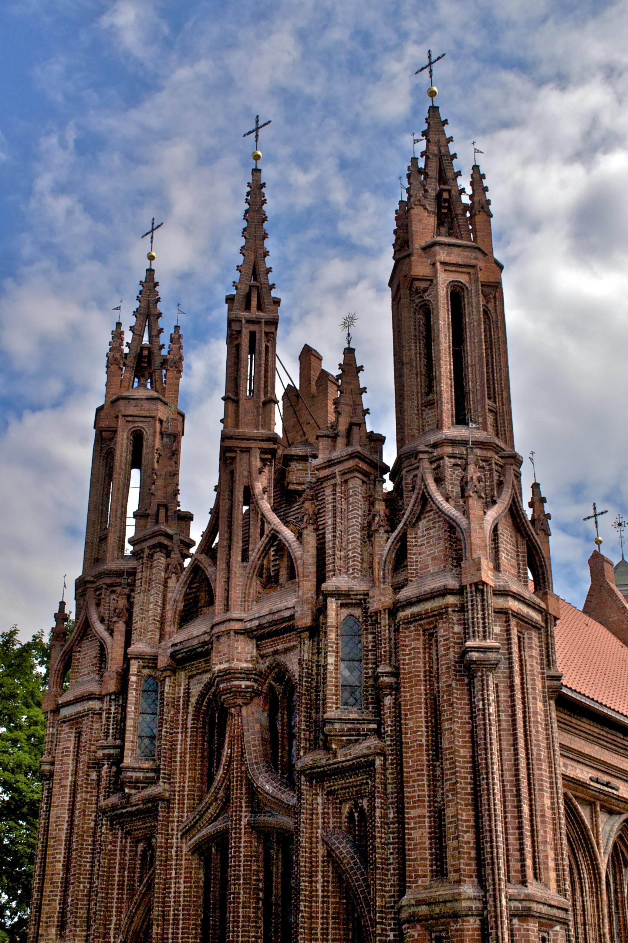 Šv. Onos bažnyčia, Vilnius